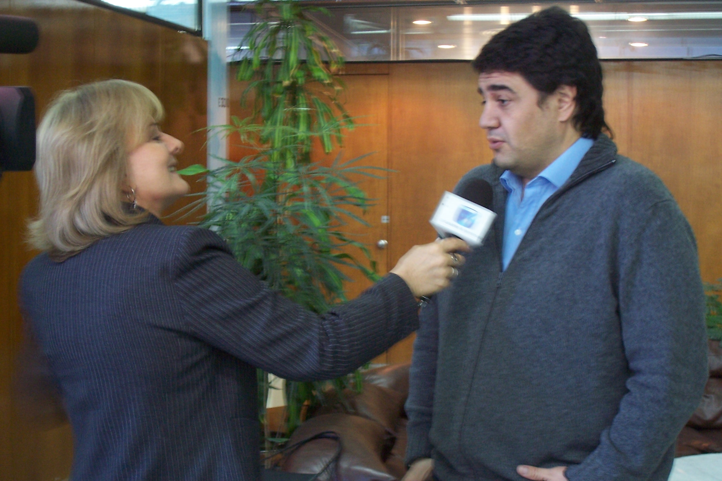 La periodista Marta Perín realizando un reportaje dentro del hall principal de Canal 7 Argentina. Agradecimientos: Hugo Barcia, Subgerente de Relaciones Institucionales y Prensa. Canal 7 Argentina.